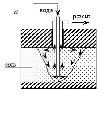 Схема